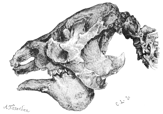 Crâne du Mégathérium du Jardin des Plantes (d’après une photographie de M. Molteni), (1/10 de grandeur naturelle).